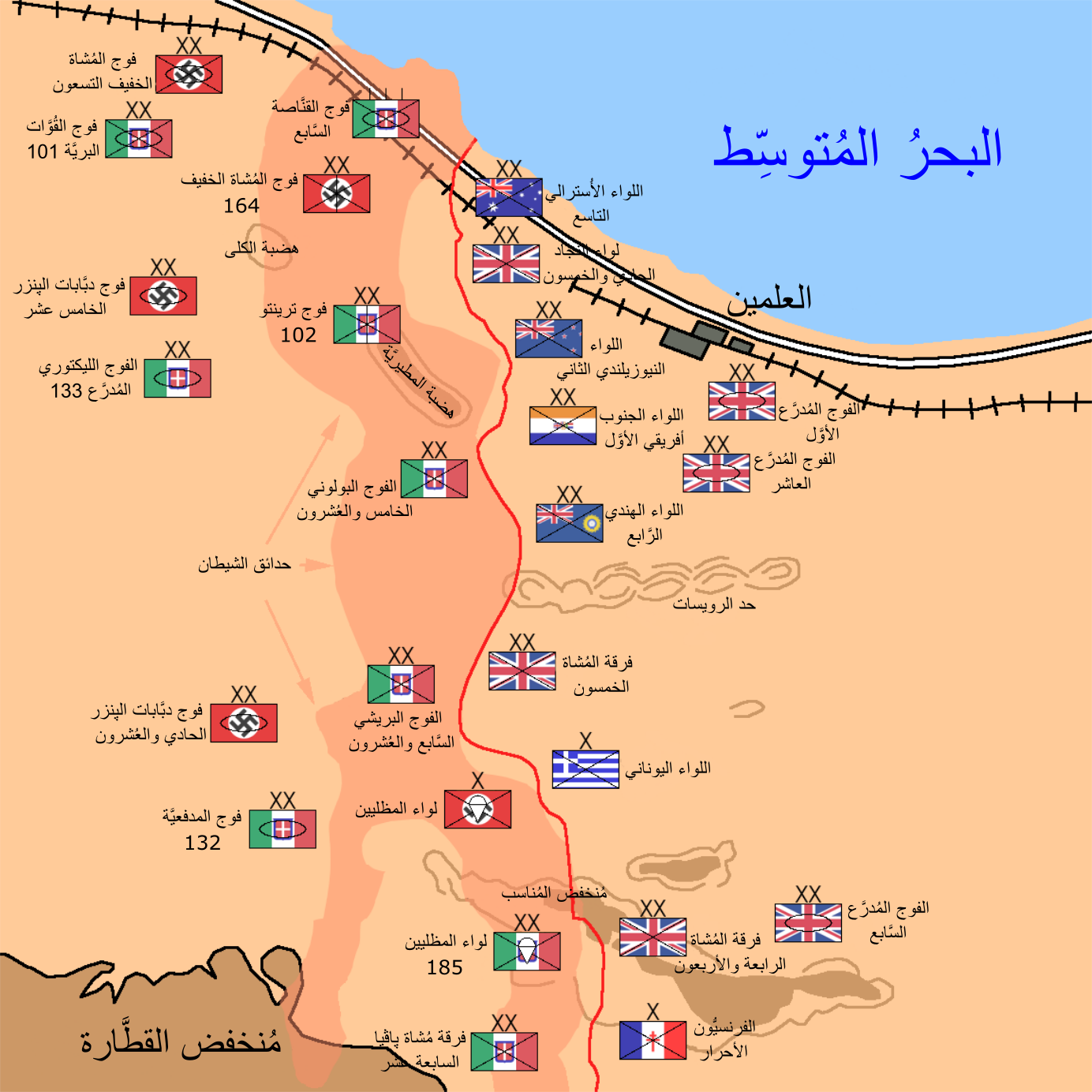 خارطة تُبيَّن توزُّع وتمركز القوى العسكريَّة المُشاركة في معركة العلمين الثانية يوم 23 تشرين الأوَّل (أكتوبر) 1942م.